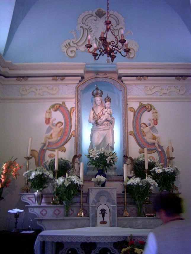 La Vierge à l'enfant, statue en marbre blanc située depuis 1848 à l'intérieur de la chapelle de Notre-Dame de Pancheraccia.